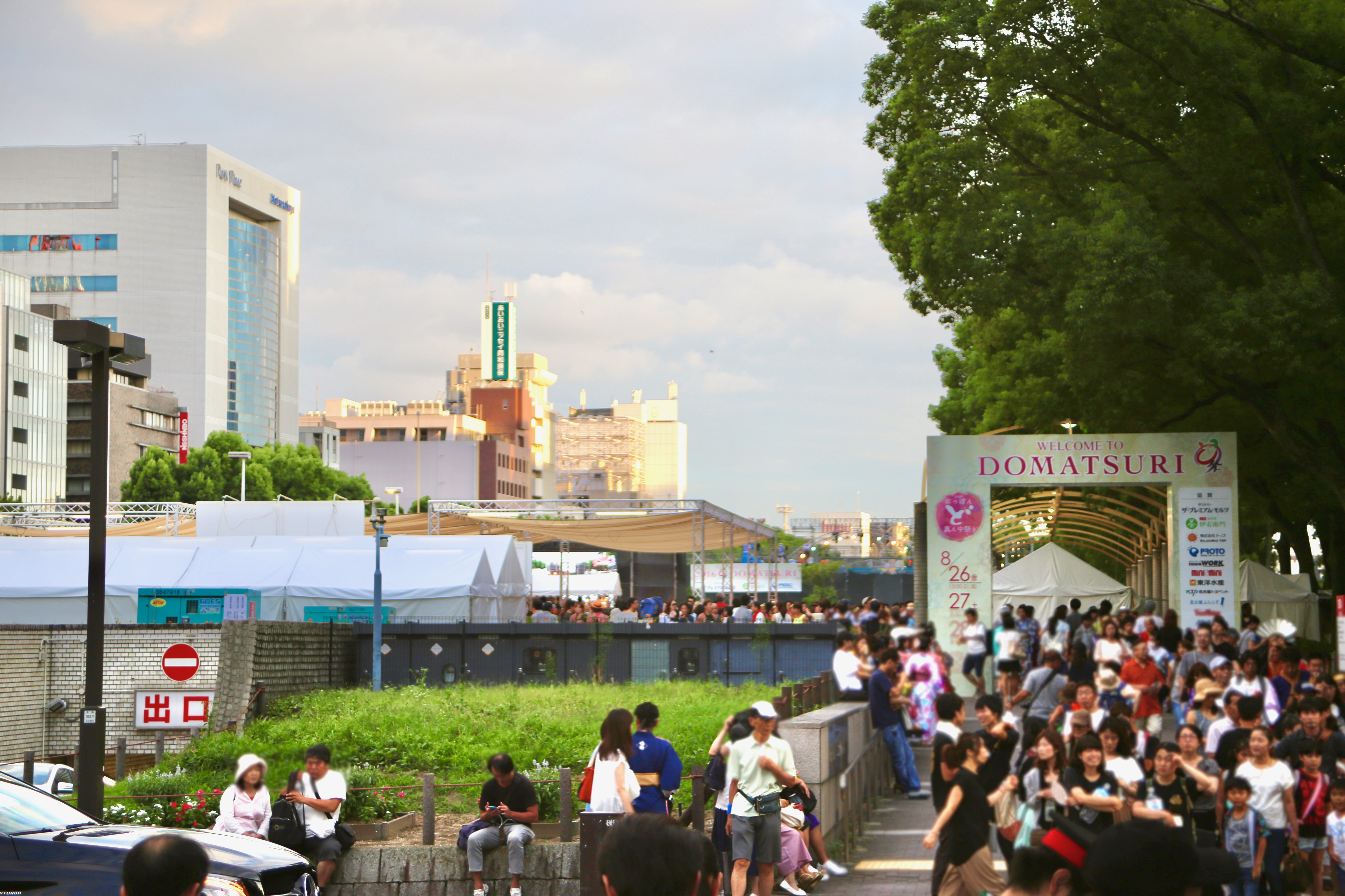 第18回にっぽんど真ん中祭り 久屋大通公園会場